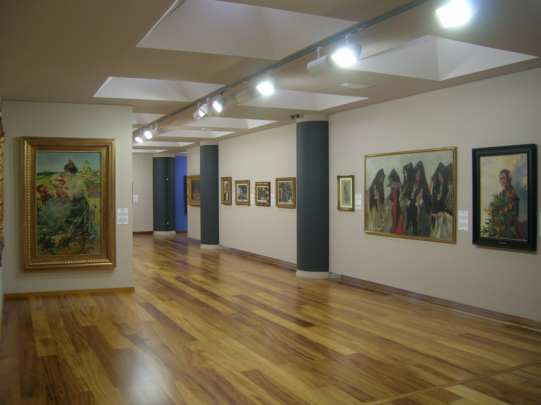 Vista de la sala que expone las pinturas más recientes de la colección pictórica Lladró